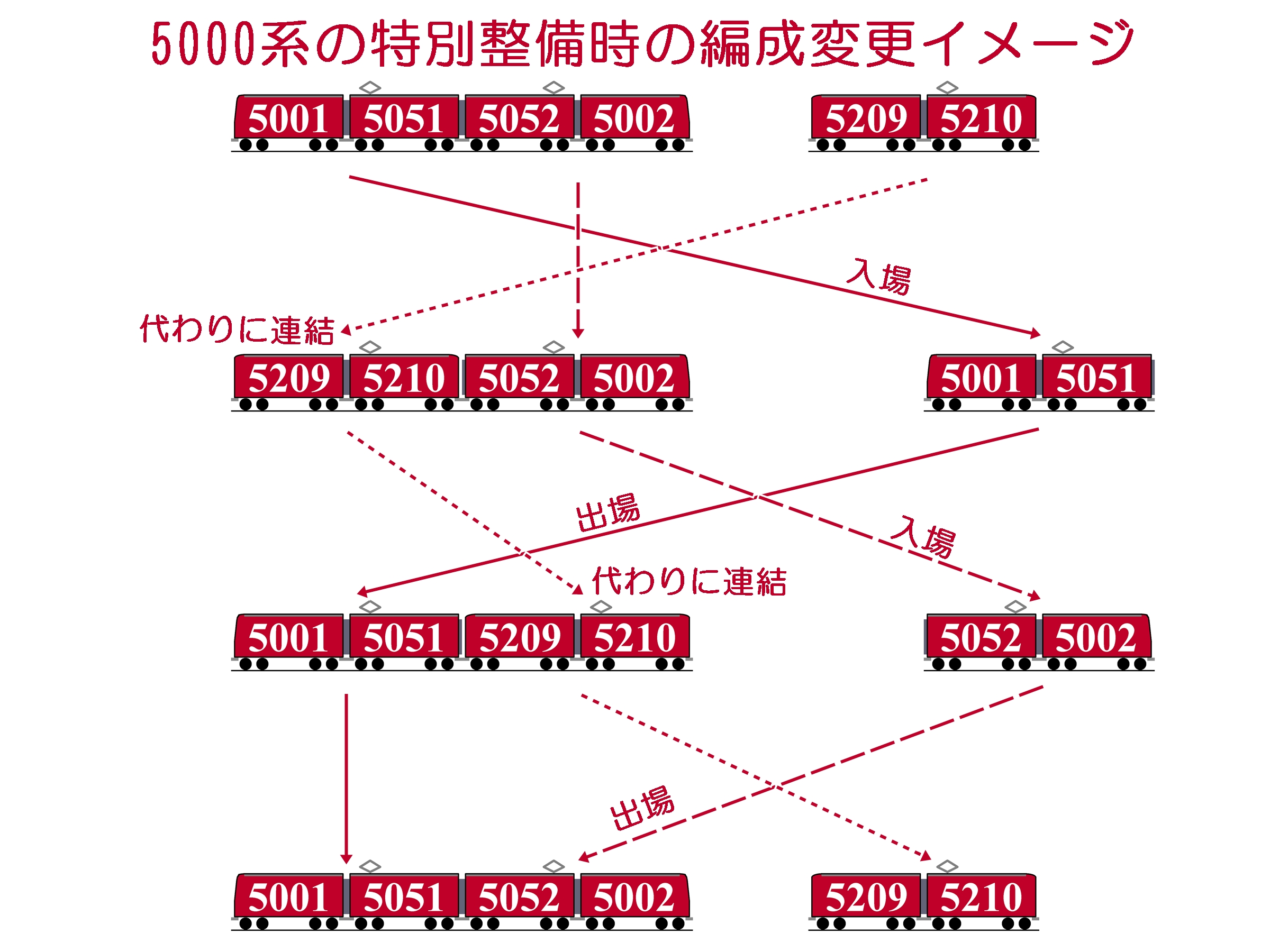 名古屋鉄道5000系の特別整備時の組成変更を示した図